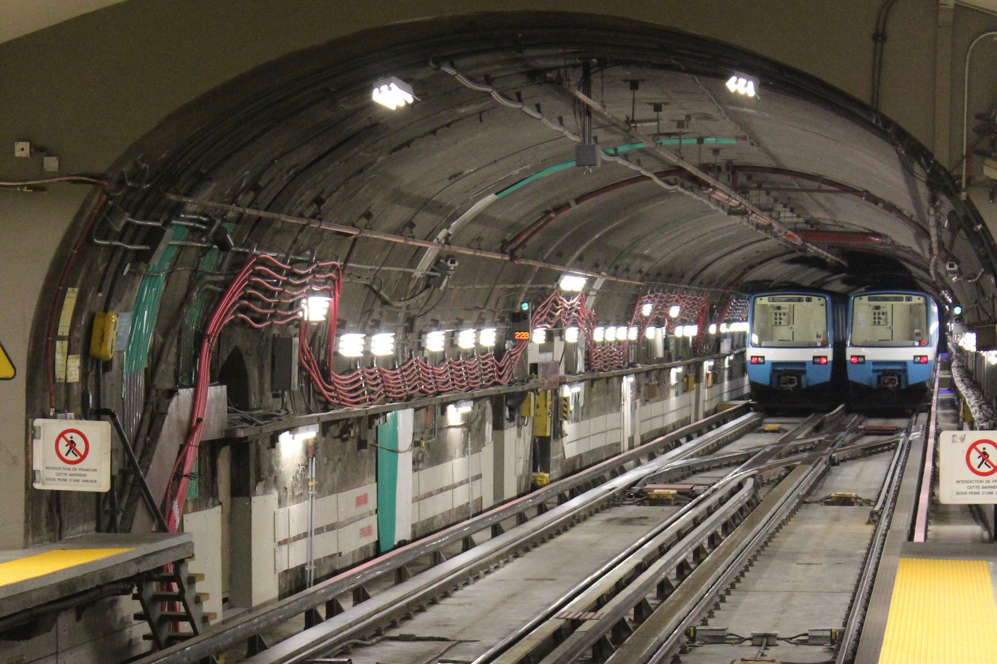 Arrière-gare Berri-UQAM ligne 4